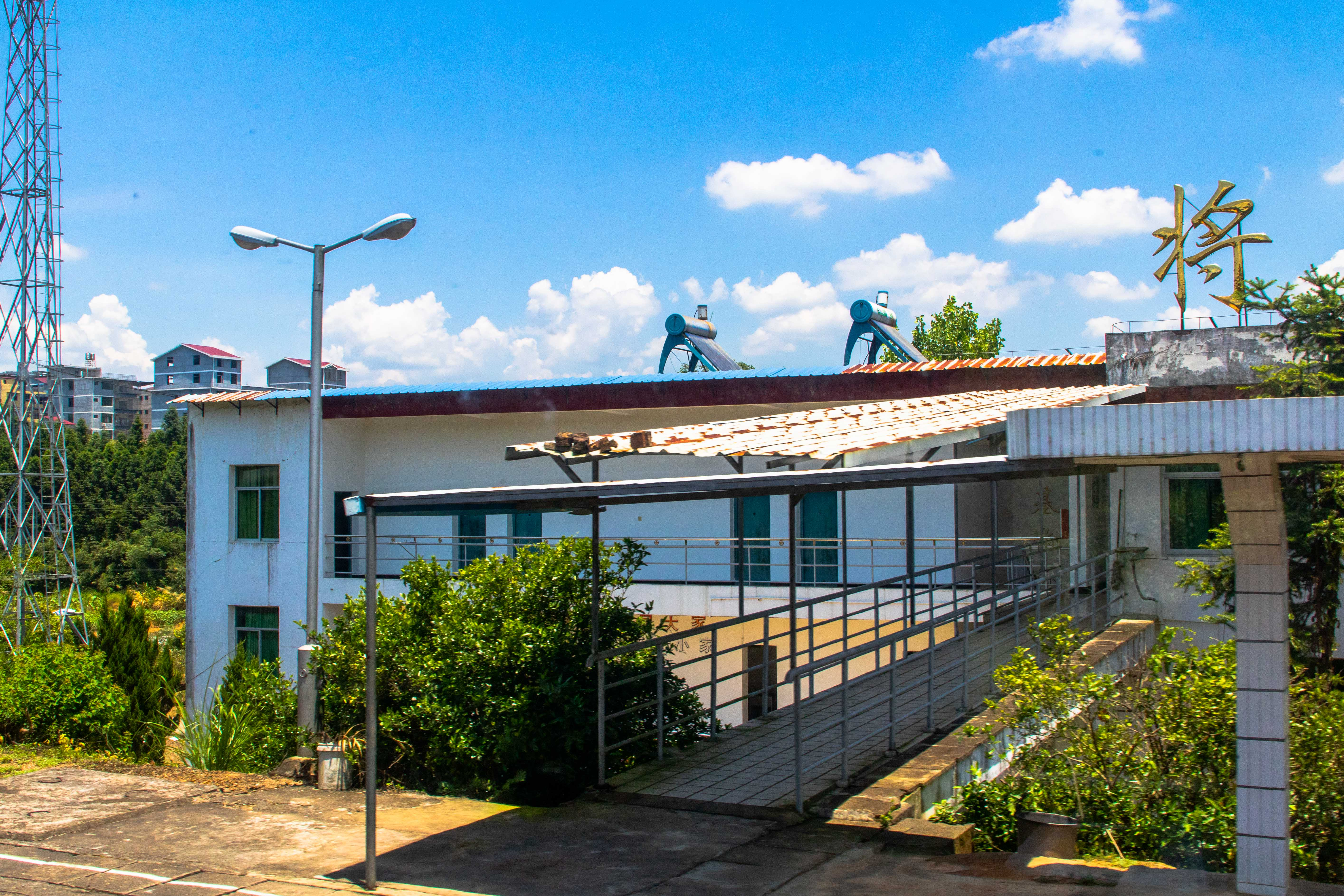 将口站站房